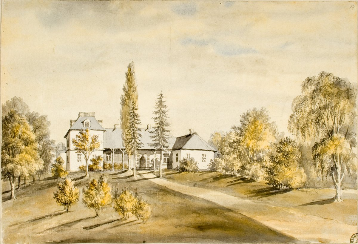 Беларуская (тарашкевіца): Мядзьвядка (Miadźviadka), сядзіба Дамейкаў (Damiejka)